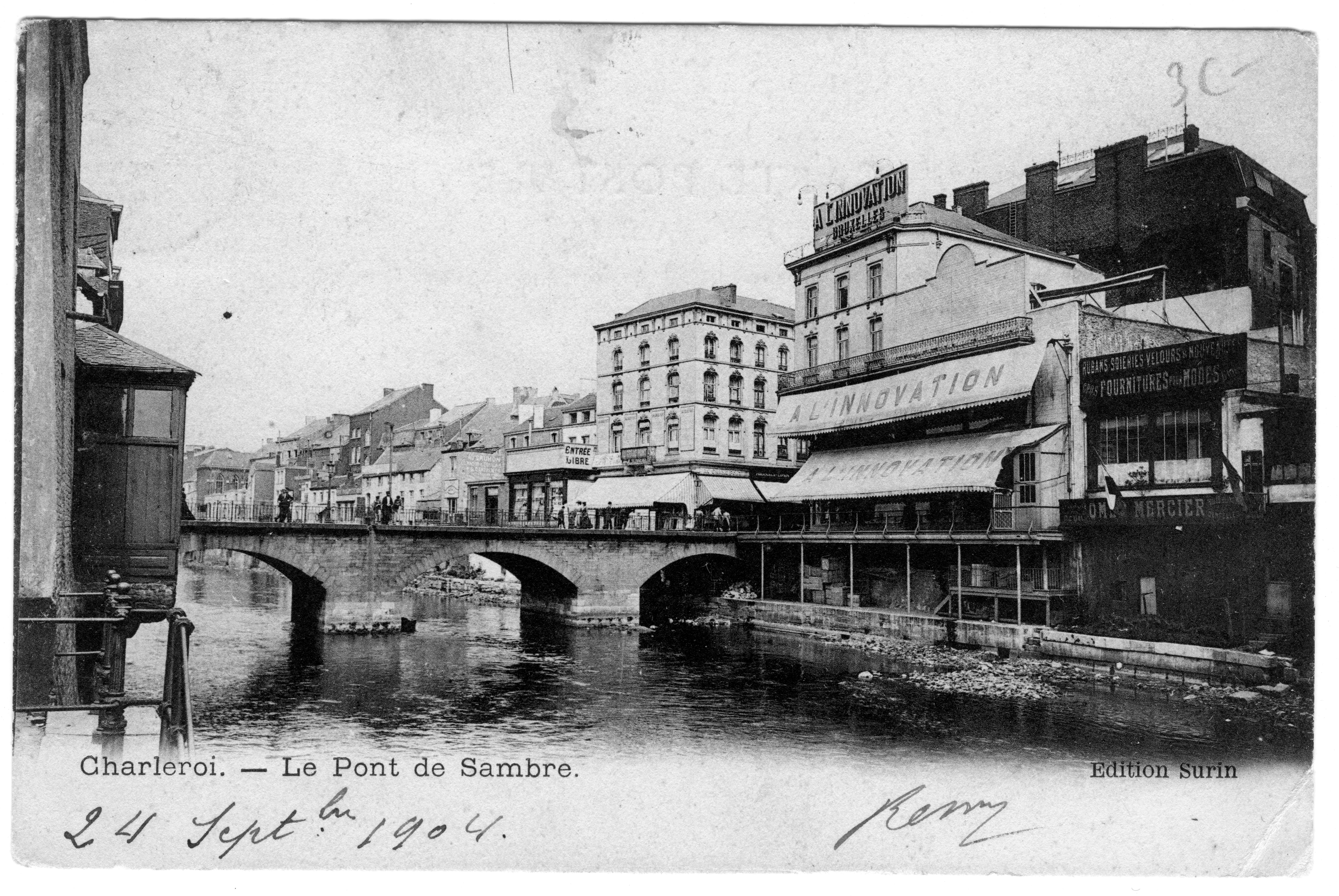 Charleroi - pont de Sambre au début du XXe siècle